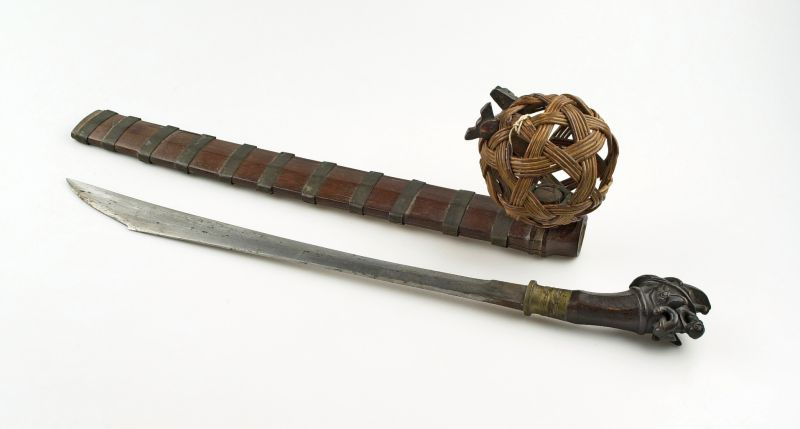 Zwaard. Zwaard met houten schede Unknown language: Balato